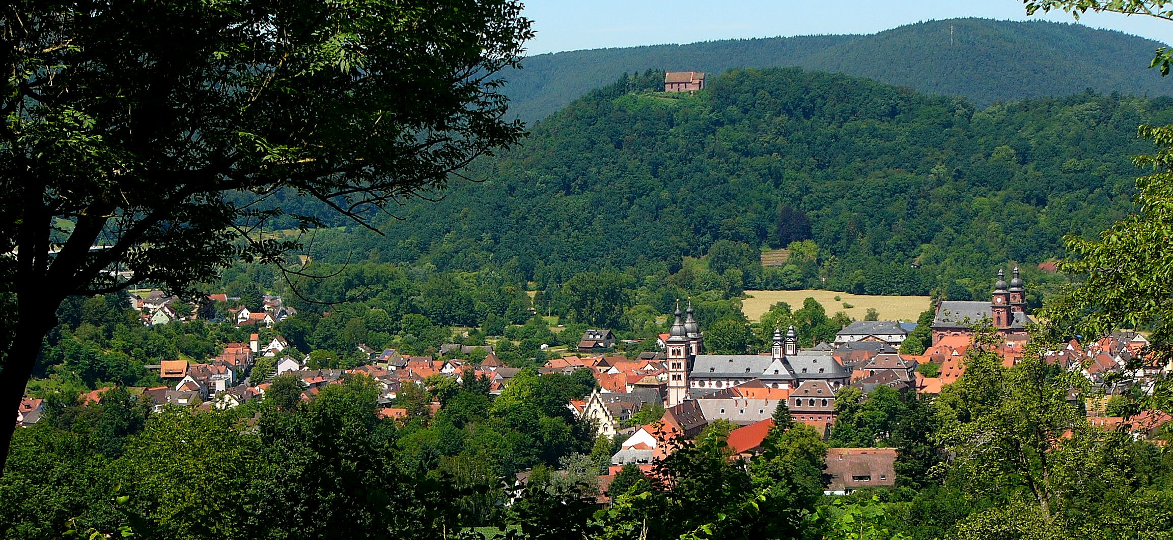 Ein Panorama von Amorbach in Unterfranken.